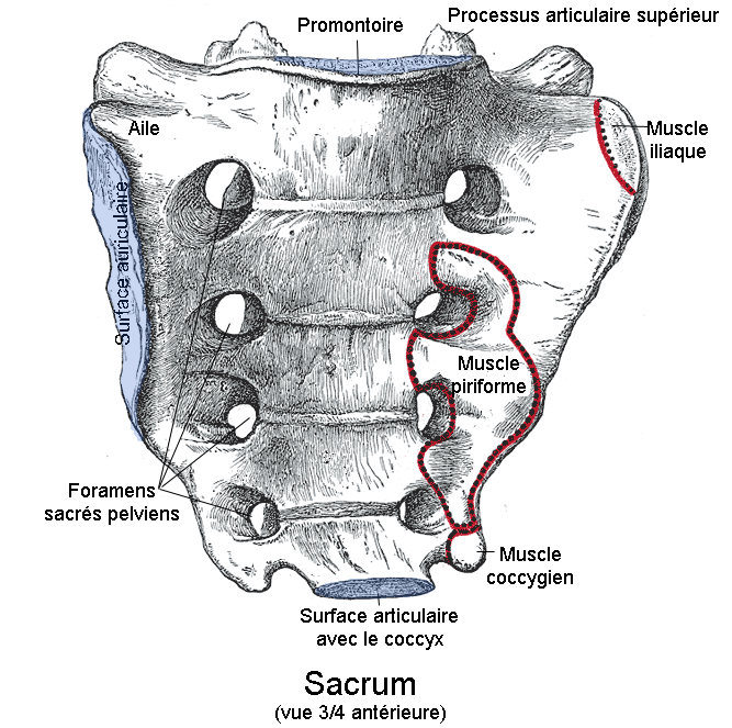 Sacrum. Vue antérieure. Anatomie humaine